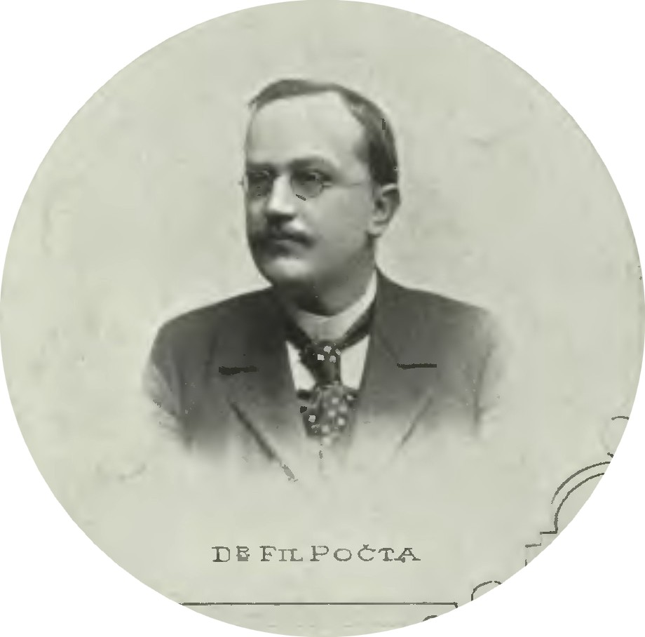 Portrét – Filip Počta (1859-1924), Český geolog a paleontolog.